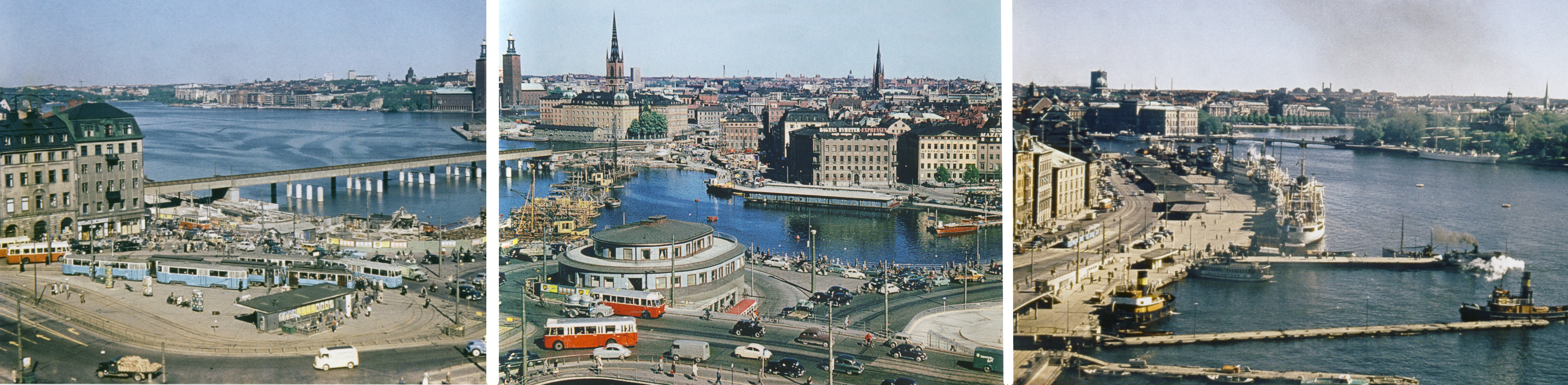 Panorama över Slussen från Katarinahissen 1956 (bildmontage av Holger Ellgaard)